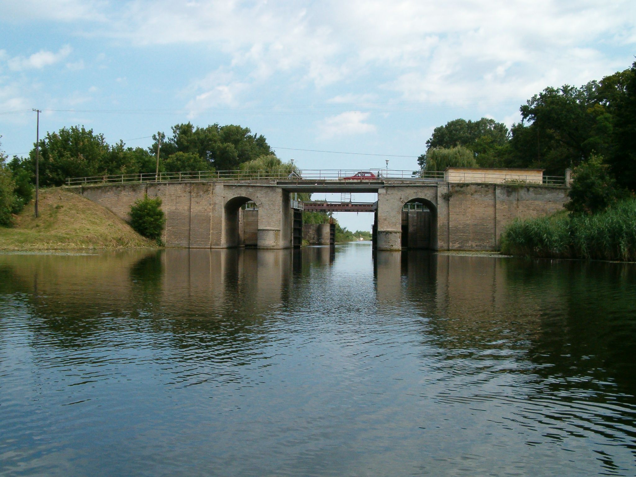 Sebesfok (Bajai-csatorna), Bezdán (Szerbia)